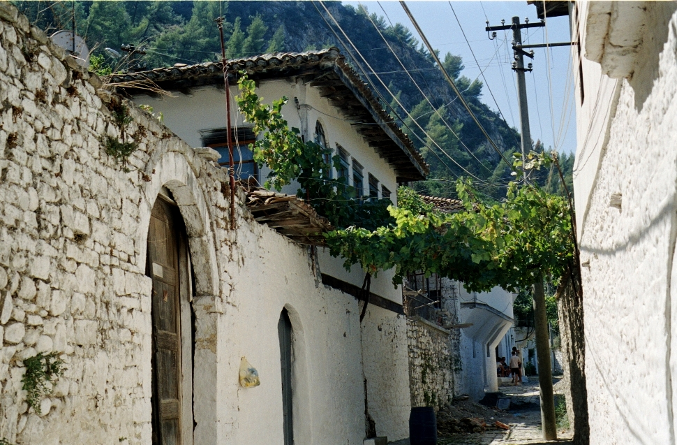 Berat, Albania